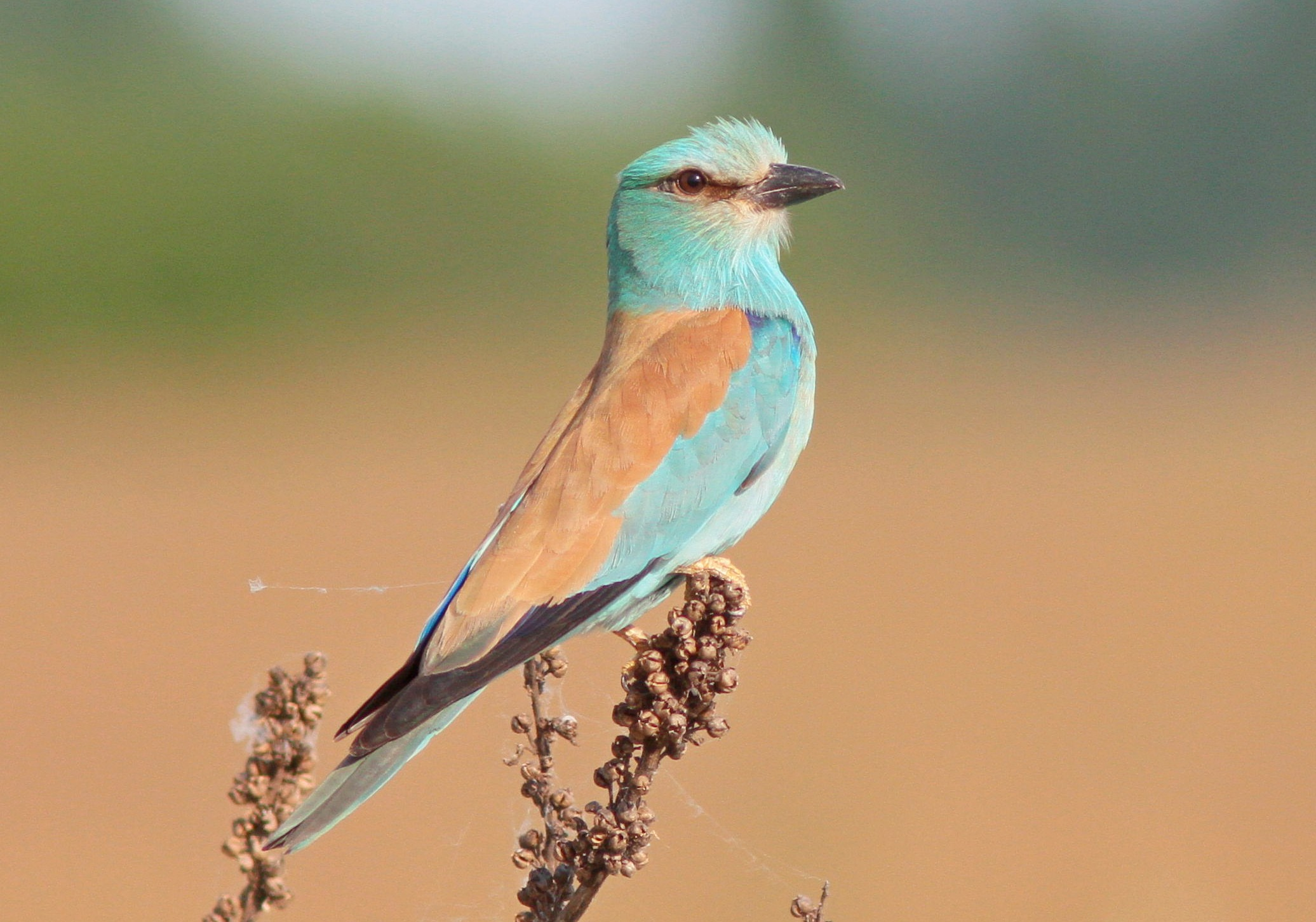 ghiandaia marina posata su un ramo